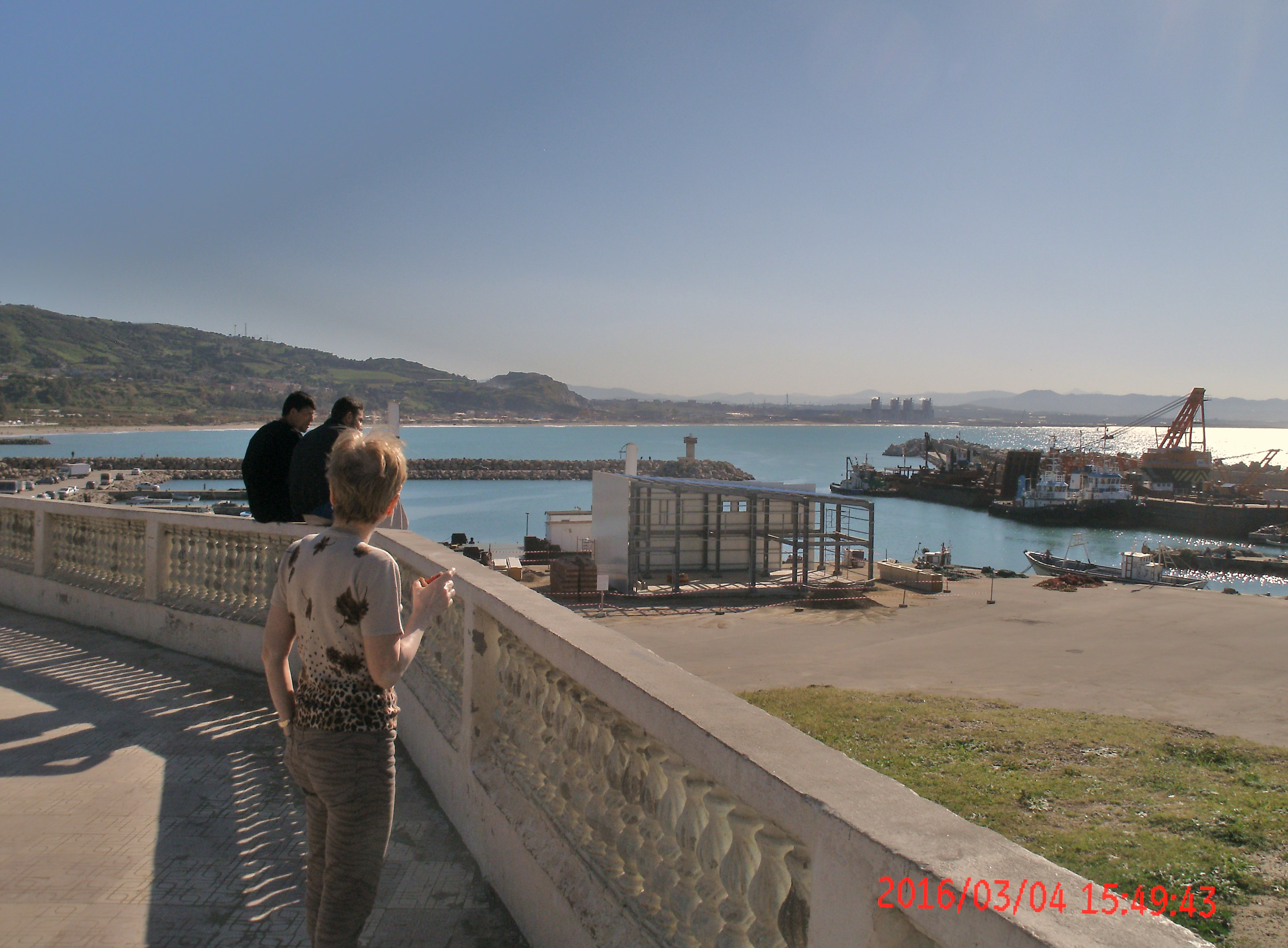 Djinet. Le port et la plage